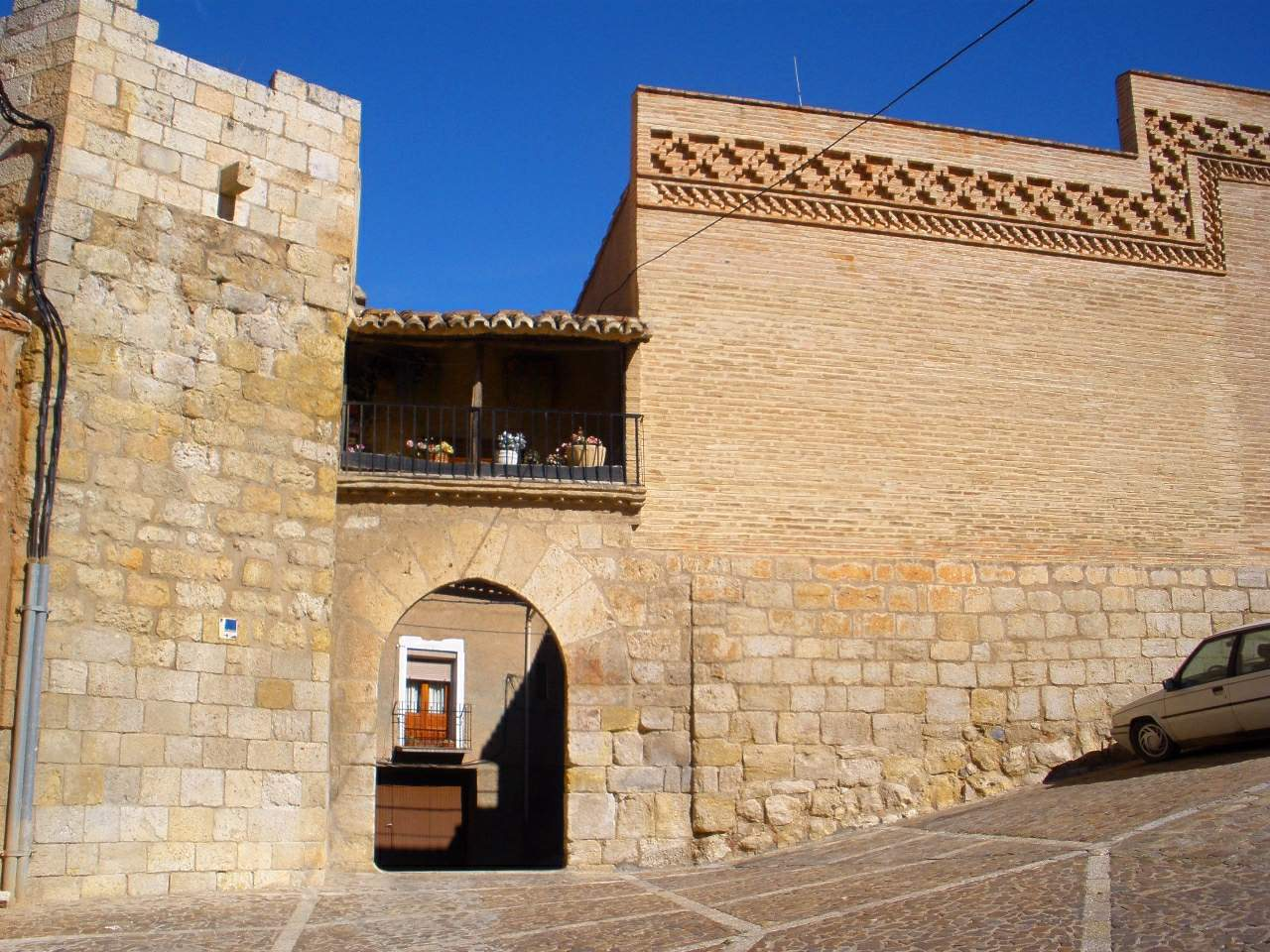 Daroca (Zaragoza) - Puerta de Valencia